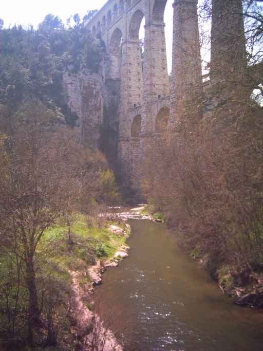 L'Arc à Roquefavour